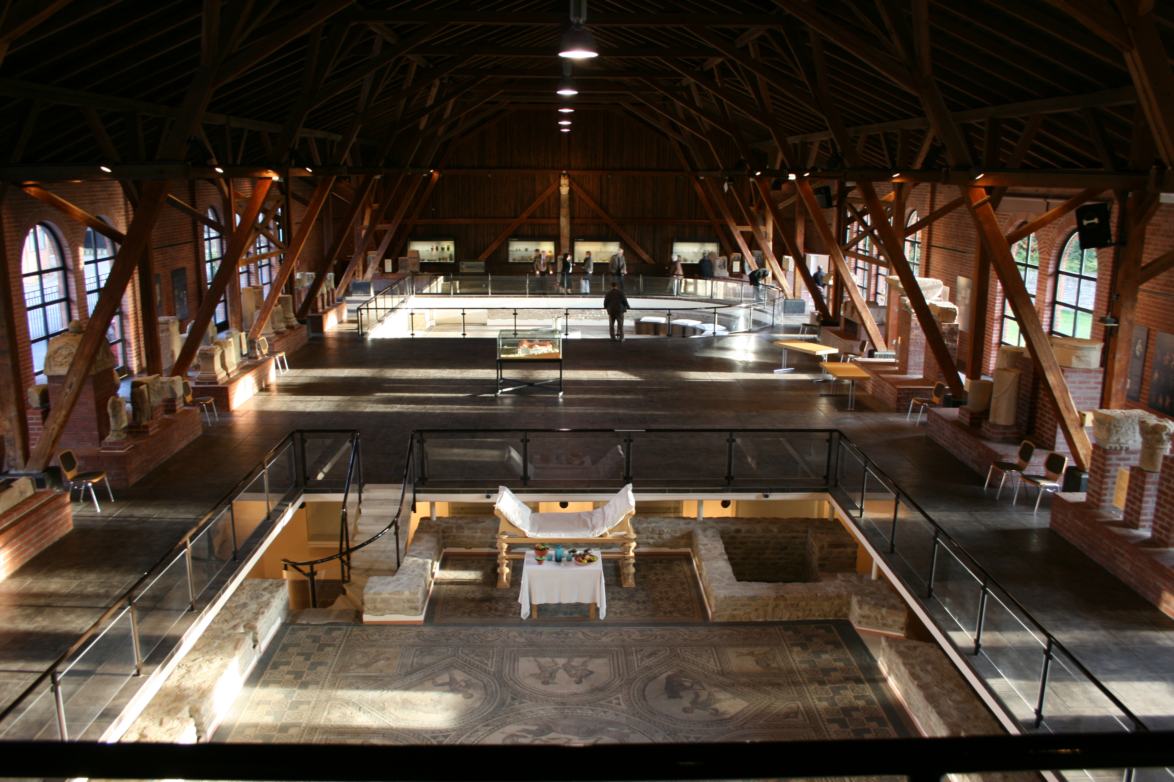 Innenraum des Museums, Blick von der Empore.